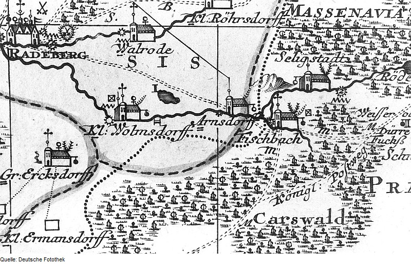 Original image description from the Deutsche Fotothek Großharthau-Seeligstadt. Seutter, Kirchenkreis Dresden, Mitte 18. Jh. (Sign.: VII 43)